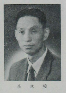 中文（台灣）: 中國人民政治協商會議第一屆全體會議代表